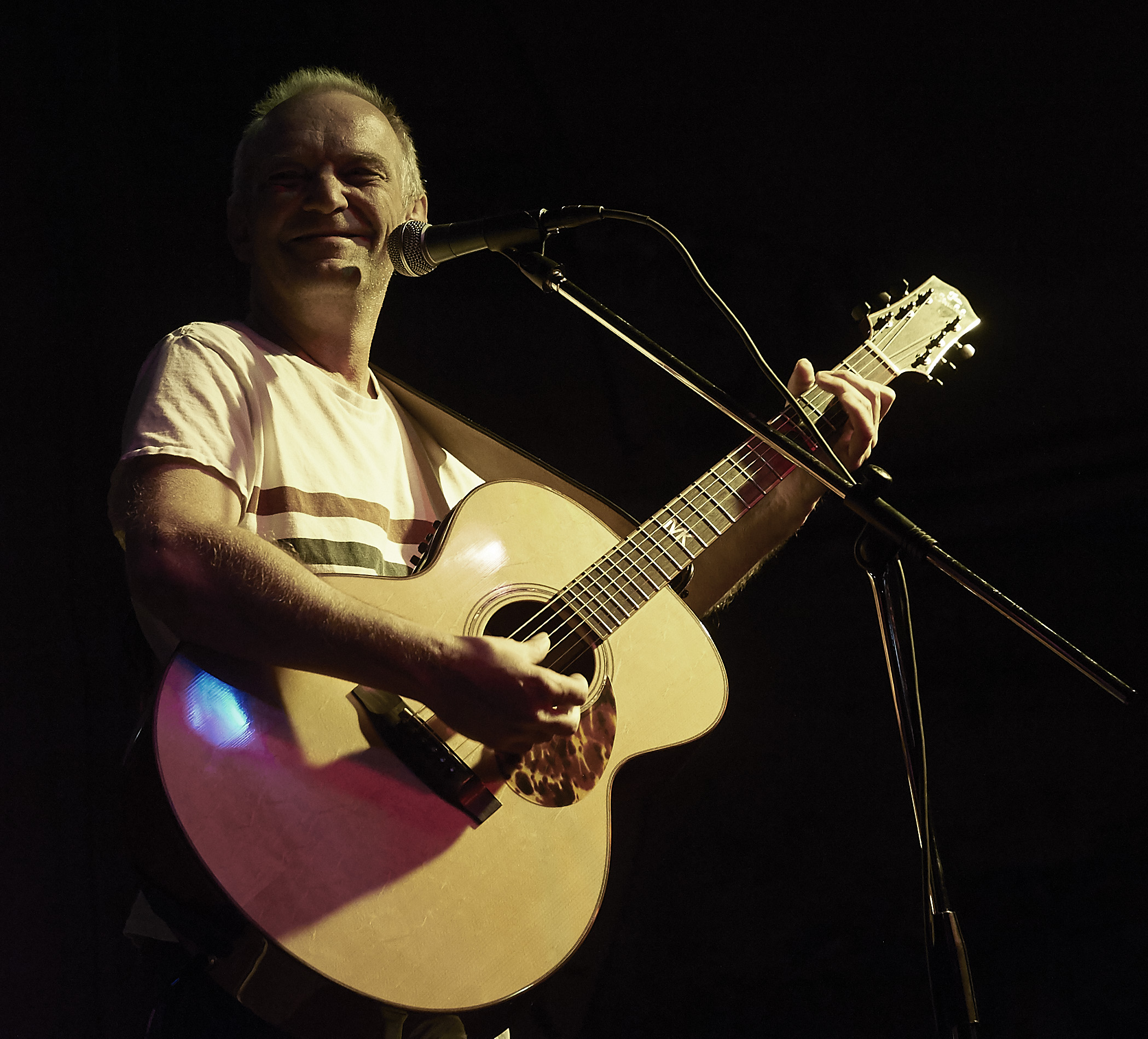 Martin Kolbe Pressefoto 2015